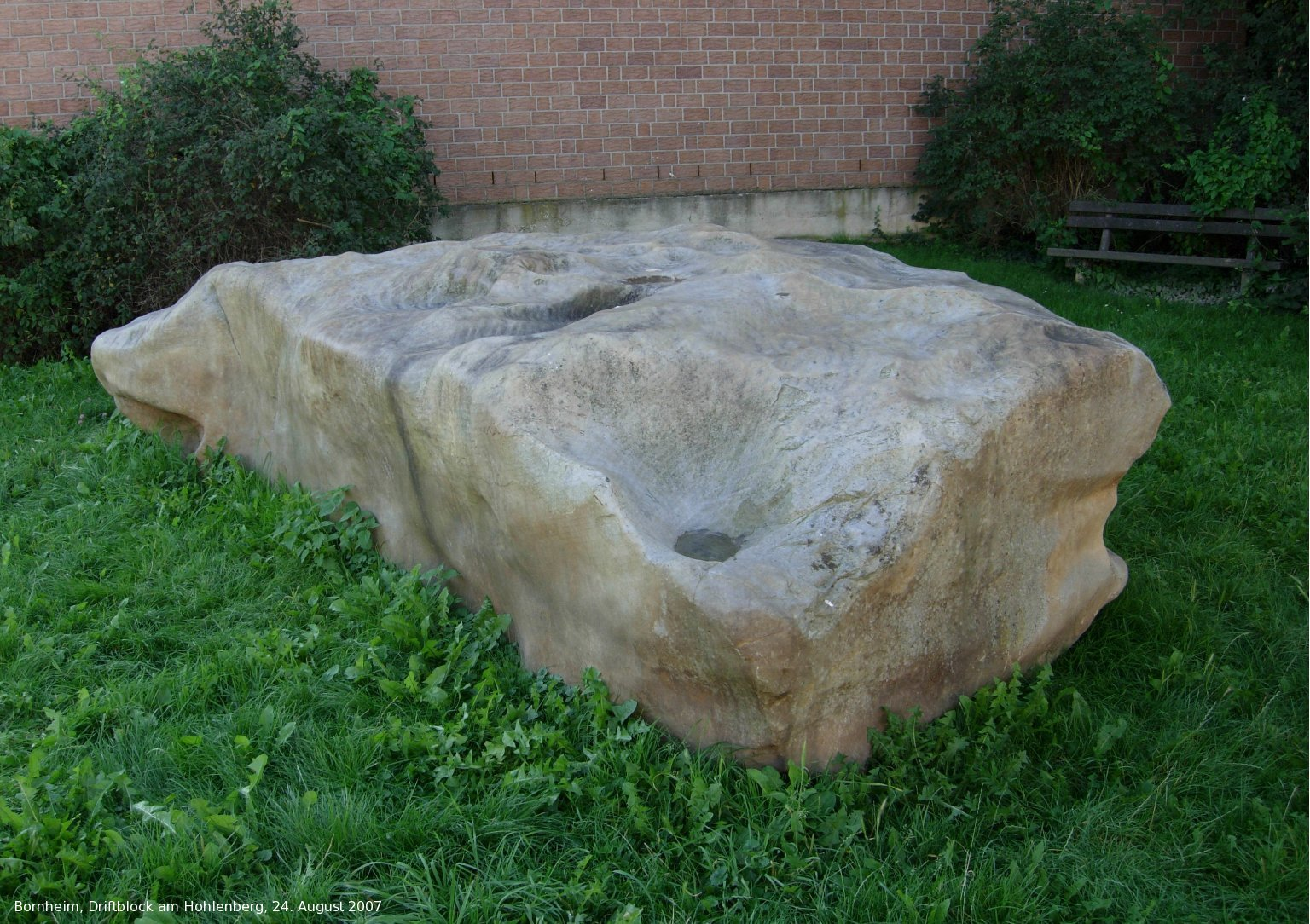 Eiszeit-Monolith in Bornheim-Brenig